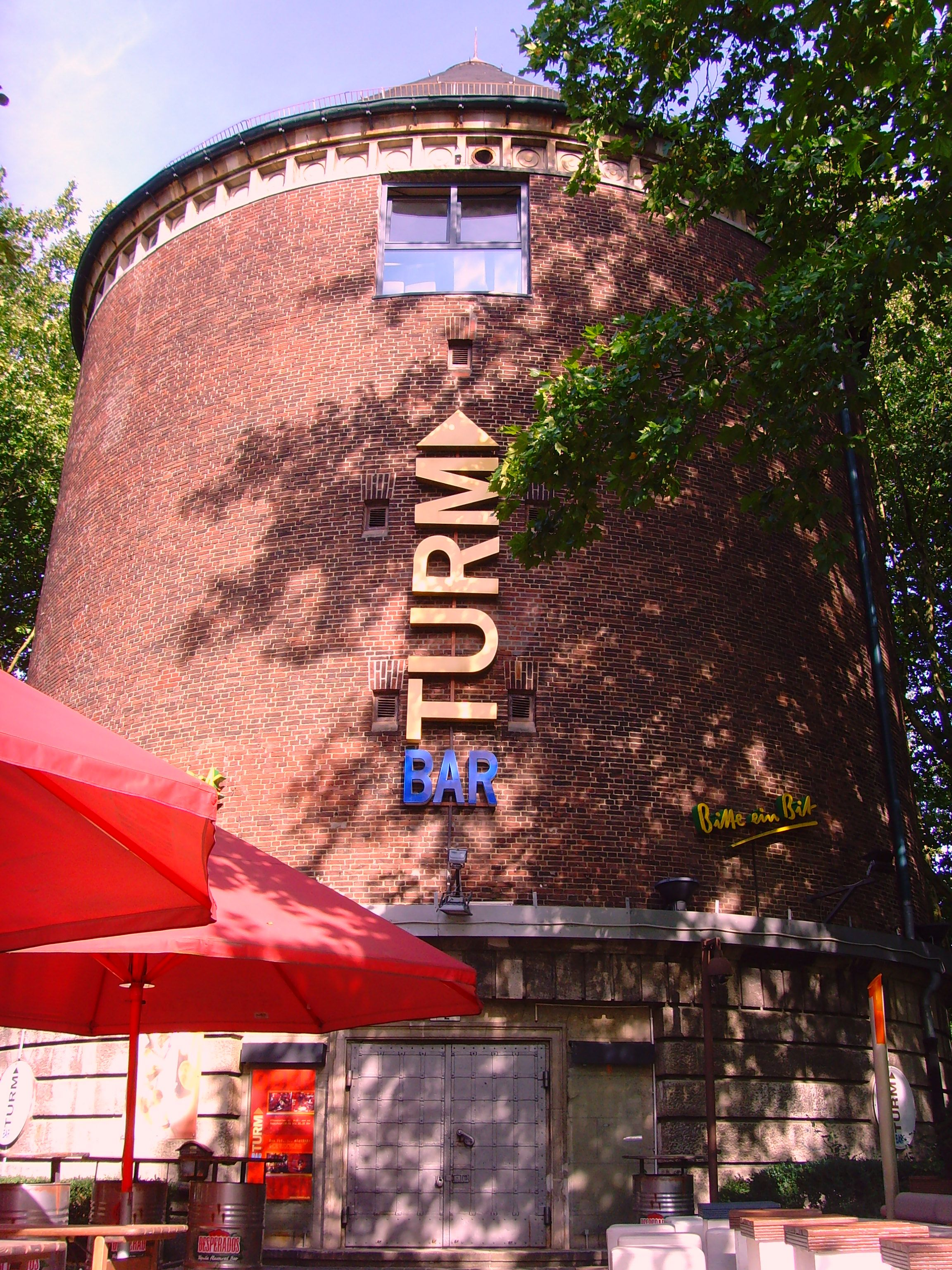 Rundbunker vom Typ Zombeck in der Rothenbaumchaussee in Rotherbaum.This is a photograph of an architectural monument.